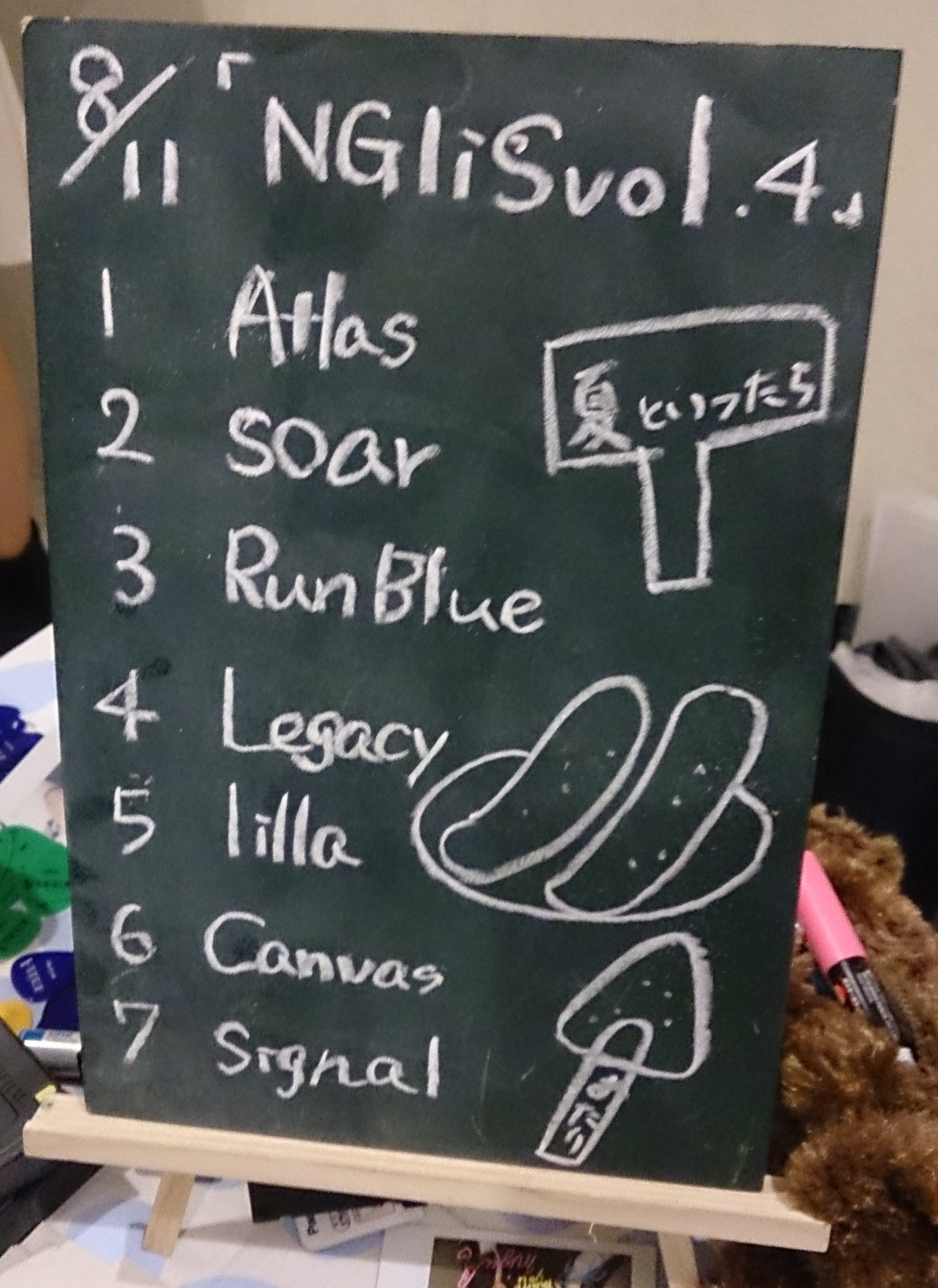 amiinAセトリボード(20160811(1))